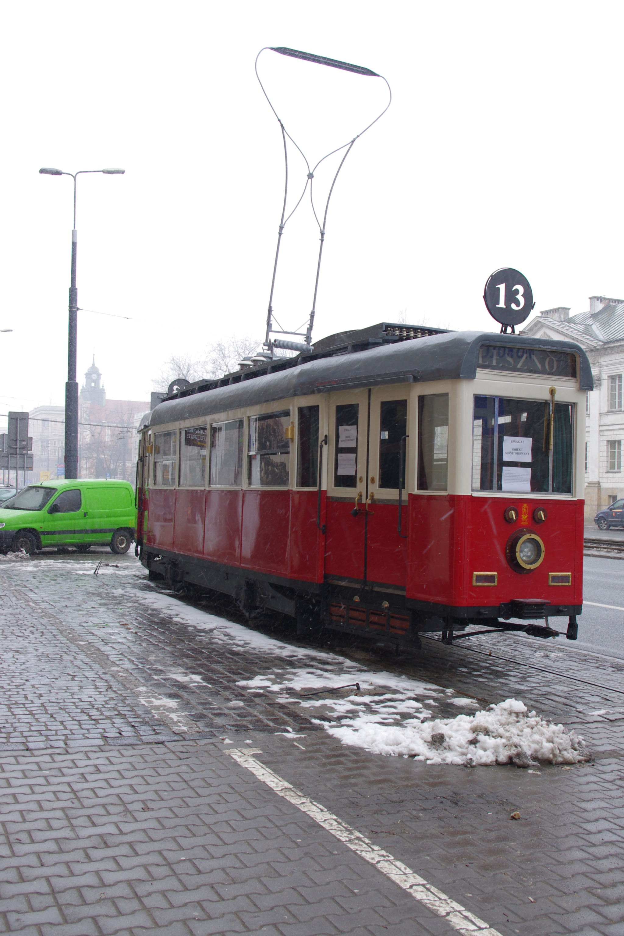 Zabytkowy tramwaj ("berlinka") przed wejściem do Teatru Kamienica w Warszawie, ustawiony w marcu 2013 r., z okazji czwartych urodziny Teatru.